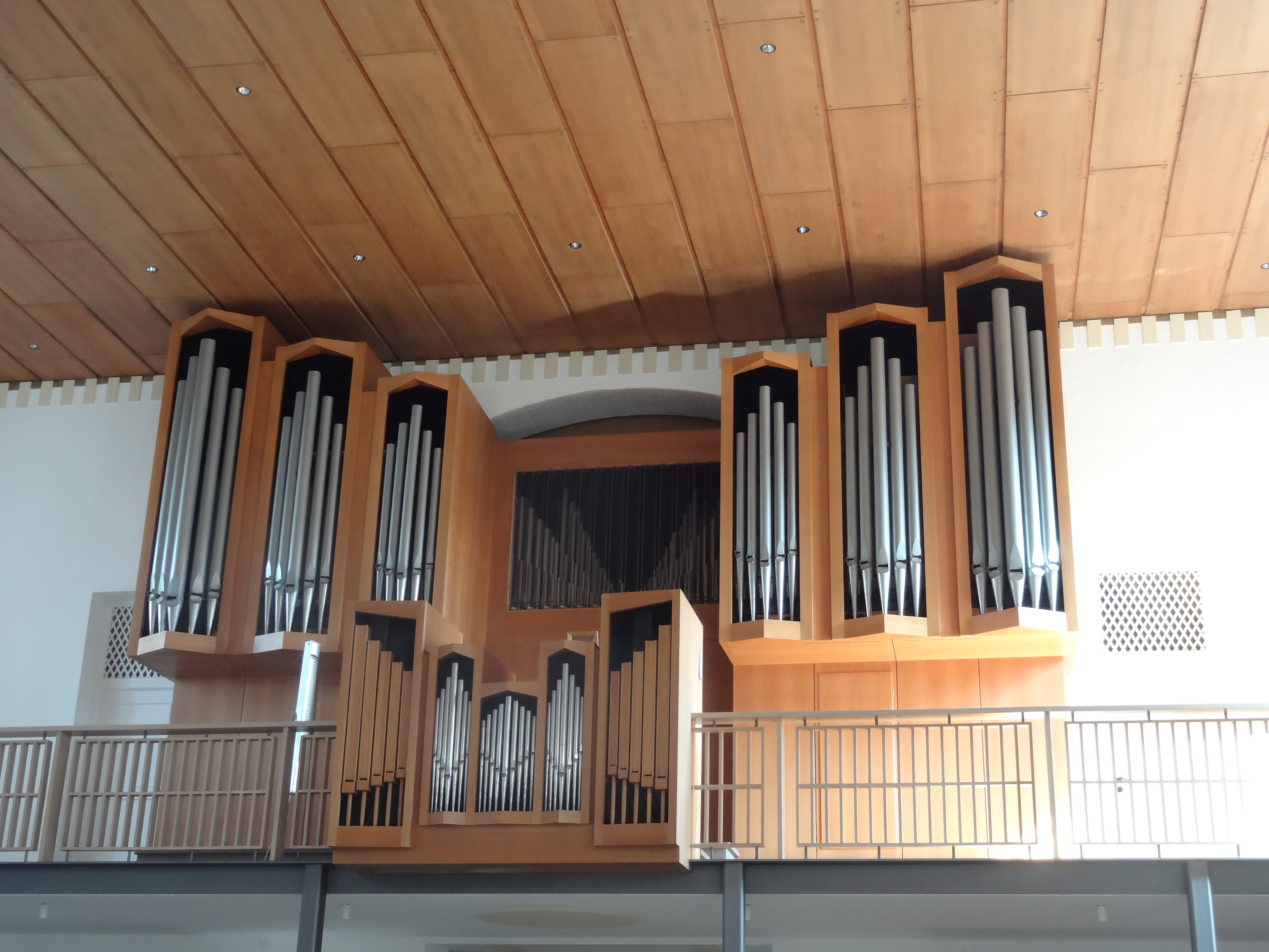 Orgel der Pfarrkirche Neu-St. Nikola in Landshut